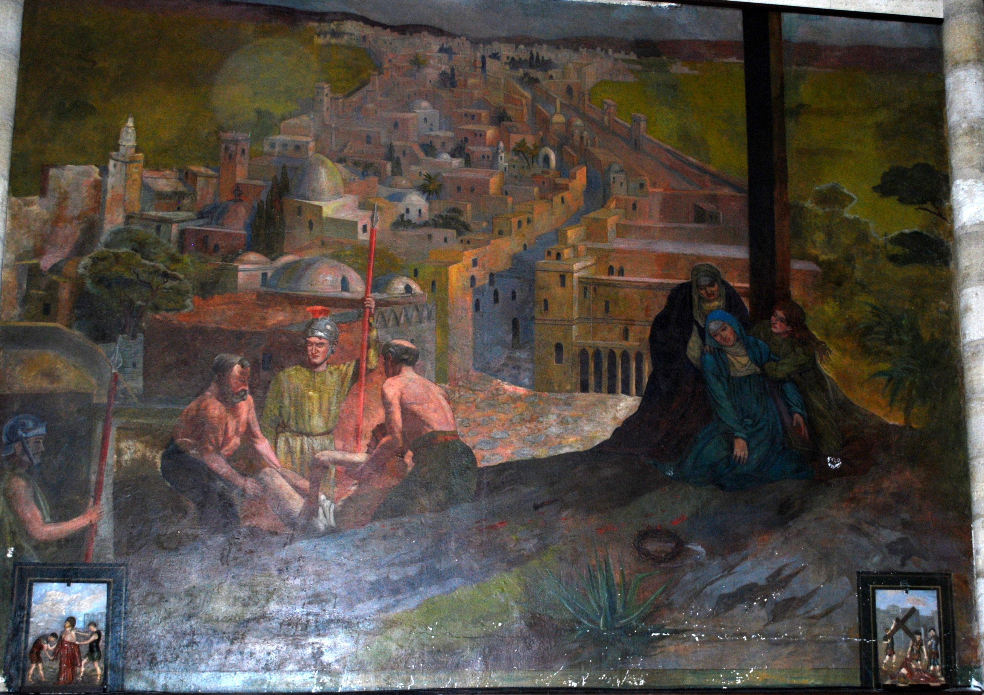 Capbreton église St Nicolas Peinture murale